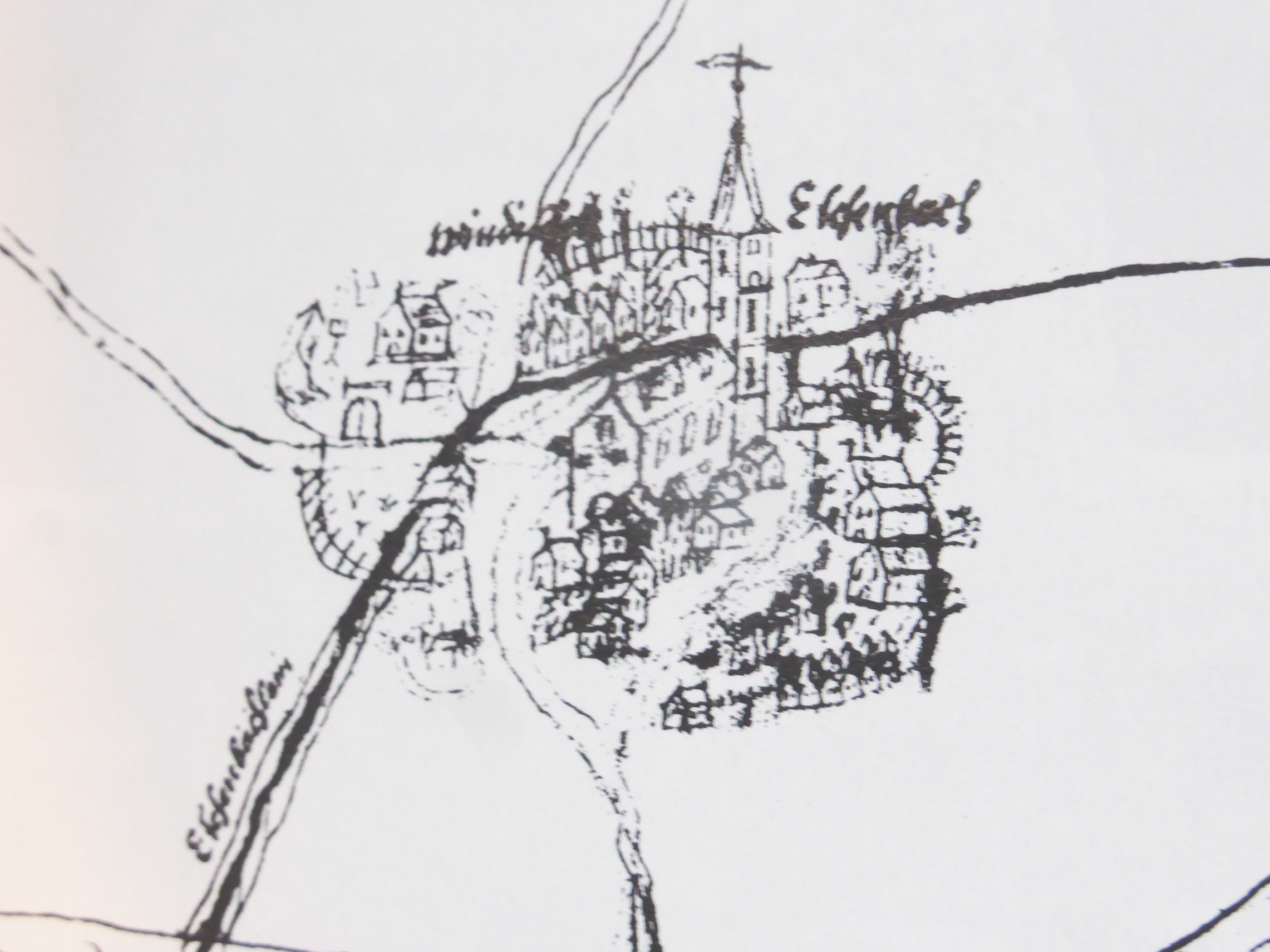 Ausschnitt aus der Karte Windischeschenbach Staatsarchiv Amberg, Plansammlung 81